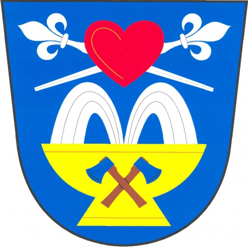 znak, Teplice nad Bečvou, okres Přerov